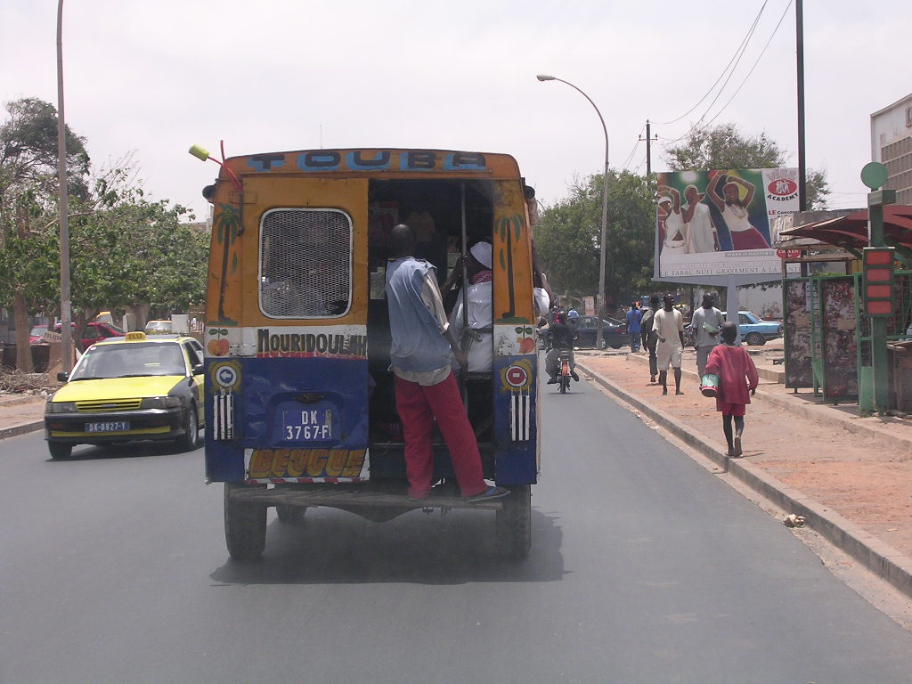 Autobús de Dakar. Por Zósimo.